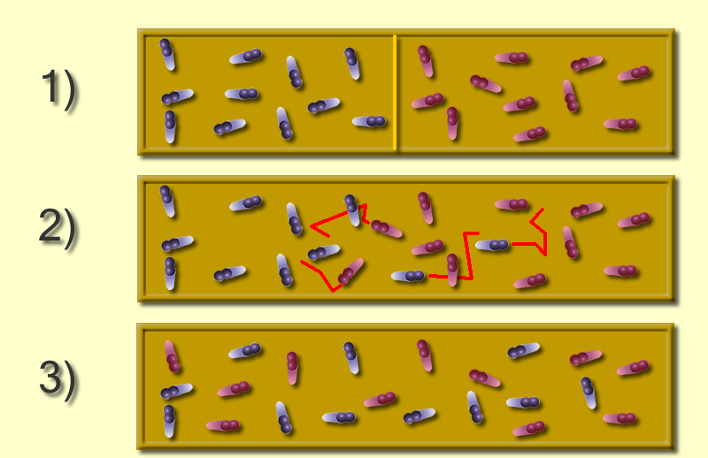 Vermischung von von Gasteilchen durch Diffusion